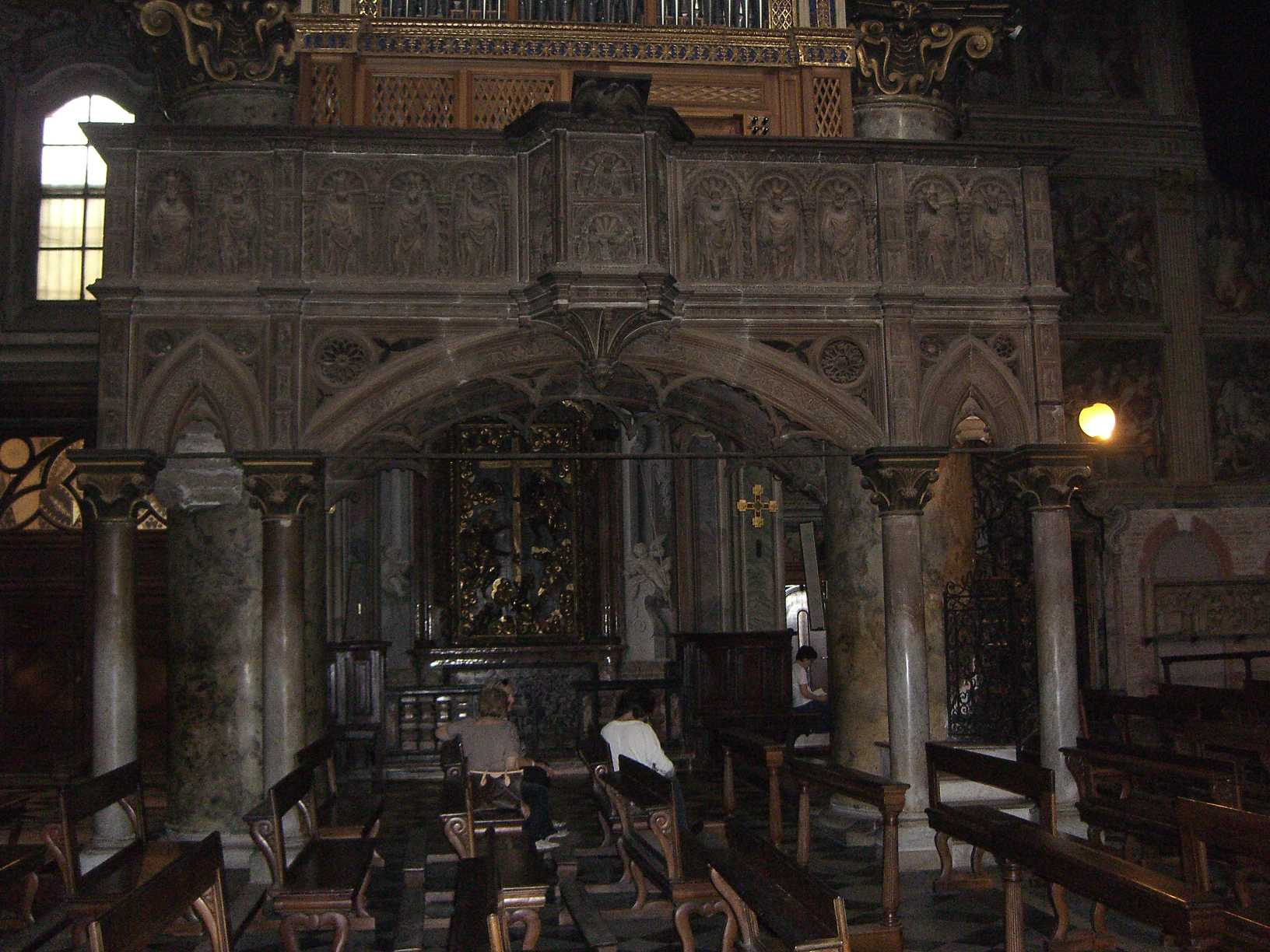 Duomo di Monza - l'ex evangelicatorio di Matteo da Campione smembrato e ricomposto in funzione di cantoria dell'organo nel XVIII secolo..